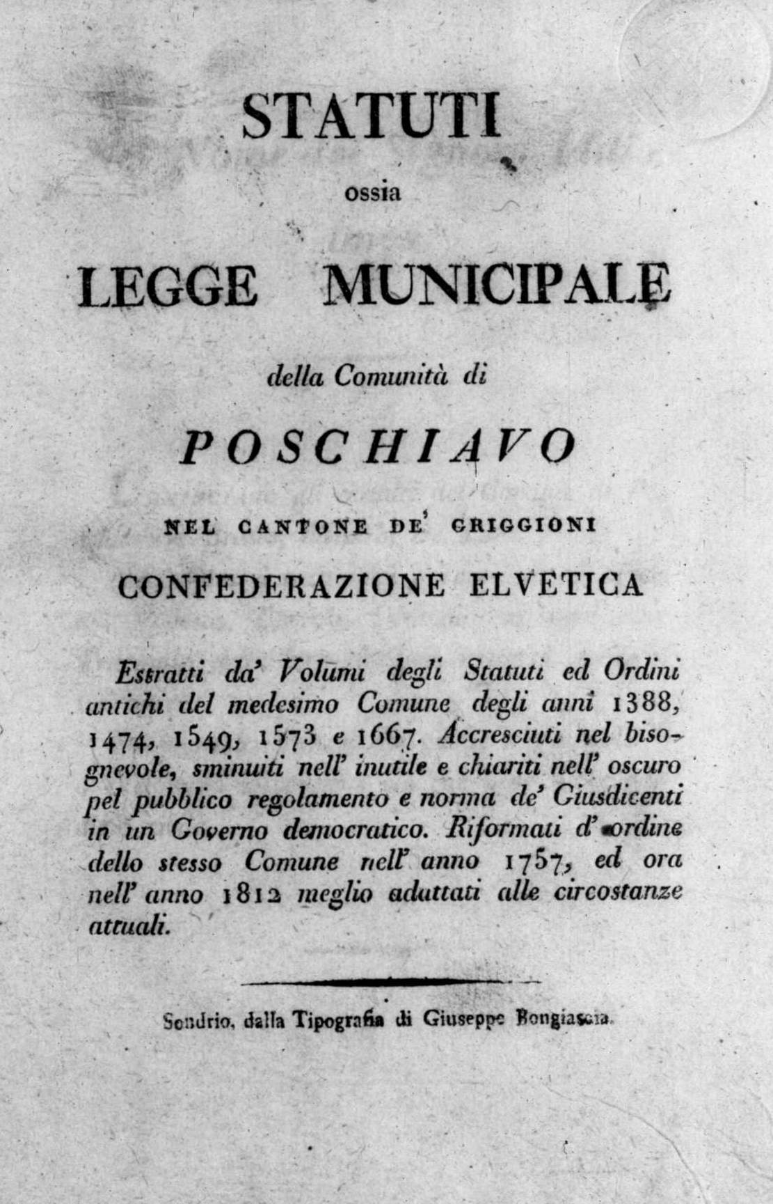 Frontespizio